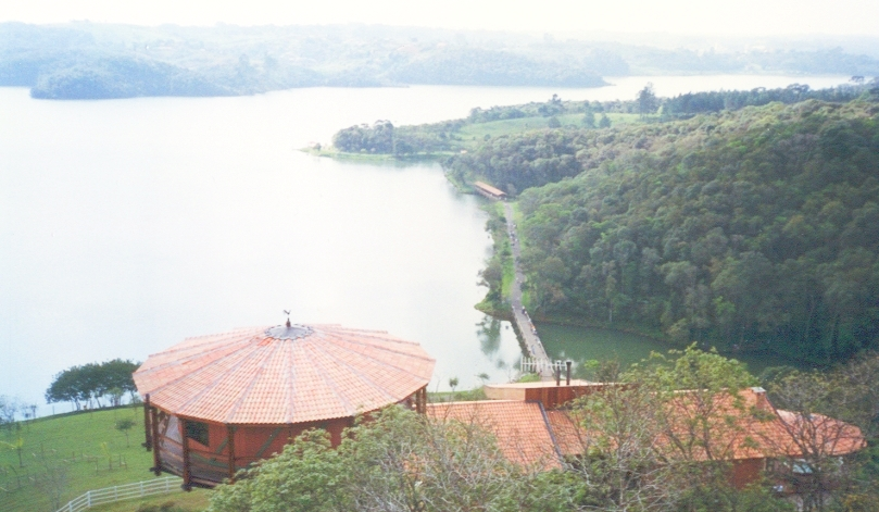 Curitiba - Represa Passaúna - Vista do Mirante